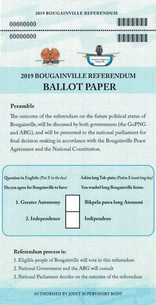 Bulletin de vote utilisé lors du référendum de 2019 à Bougainville